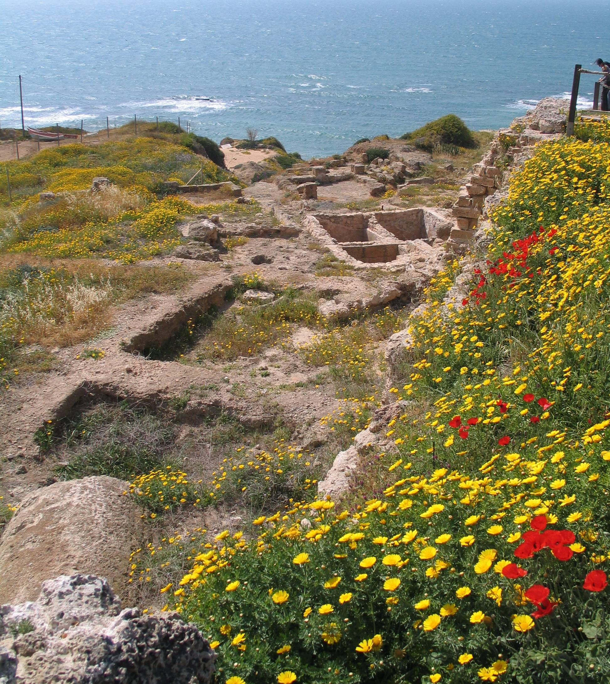 A roman villa. Apollonia National Park, Israel.